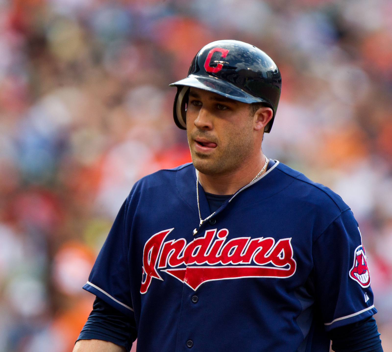 Jason Kipnis